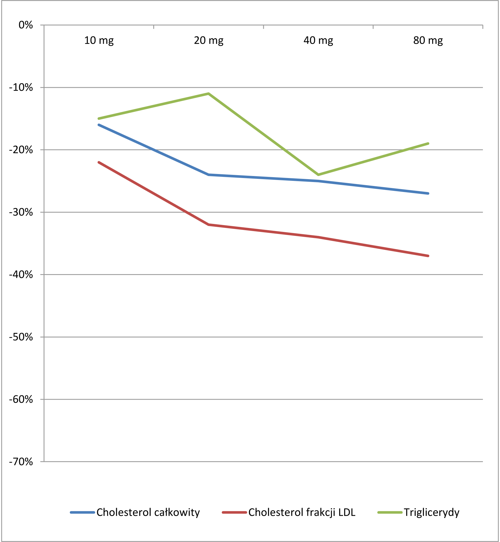 Wpływ prawastatyny na wskaźniki lipidowe (dane do wykresu za PRAVACHOL (pravastatin sodium) Tablets)